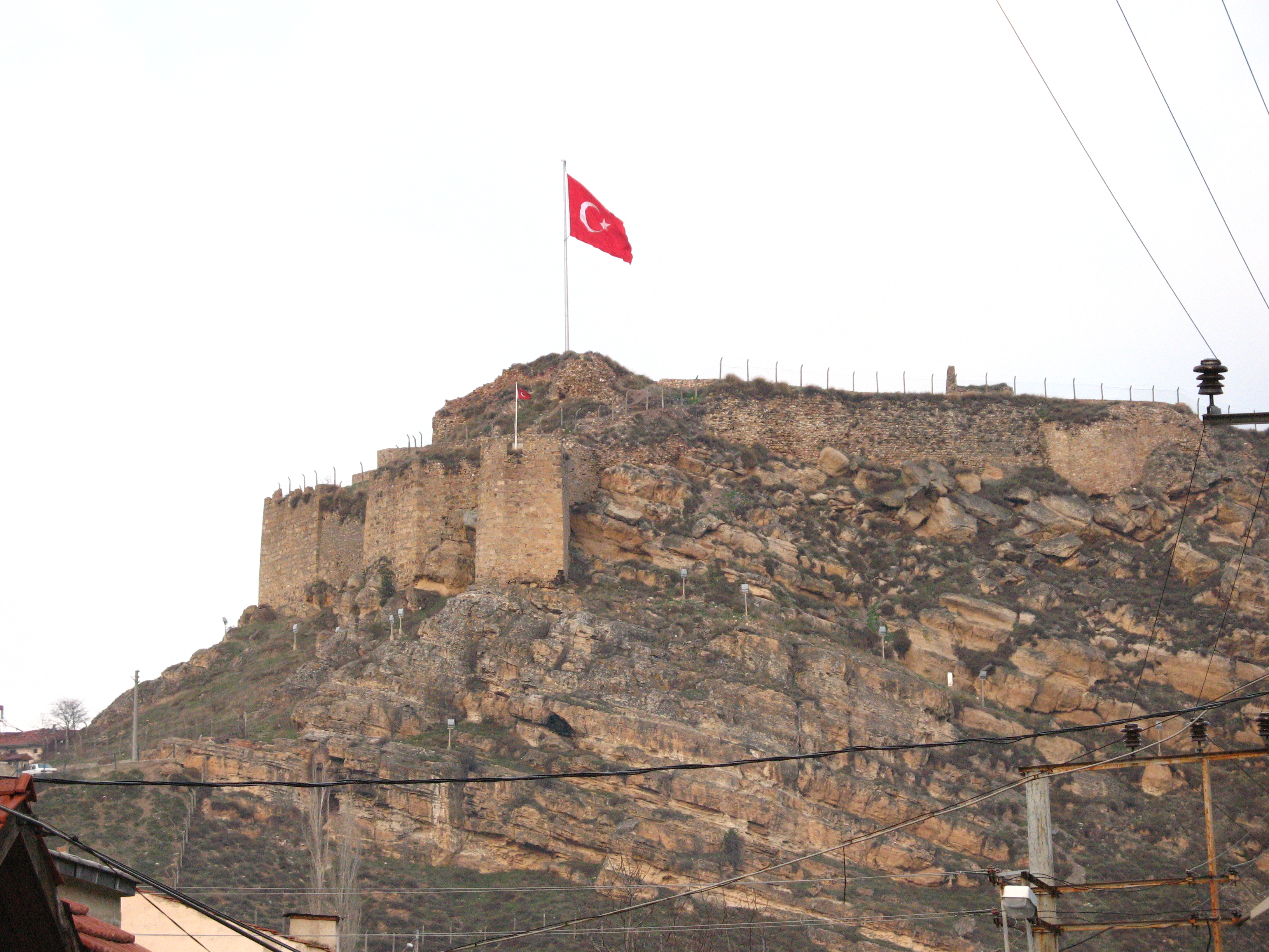 kastamonu kalesi